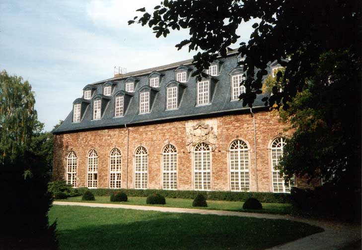 Orangerie in Wernigerode, heute Standort der Abteilung Magdeburg des Landeshauptarchivs Sachsen-Anhalt